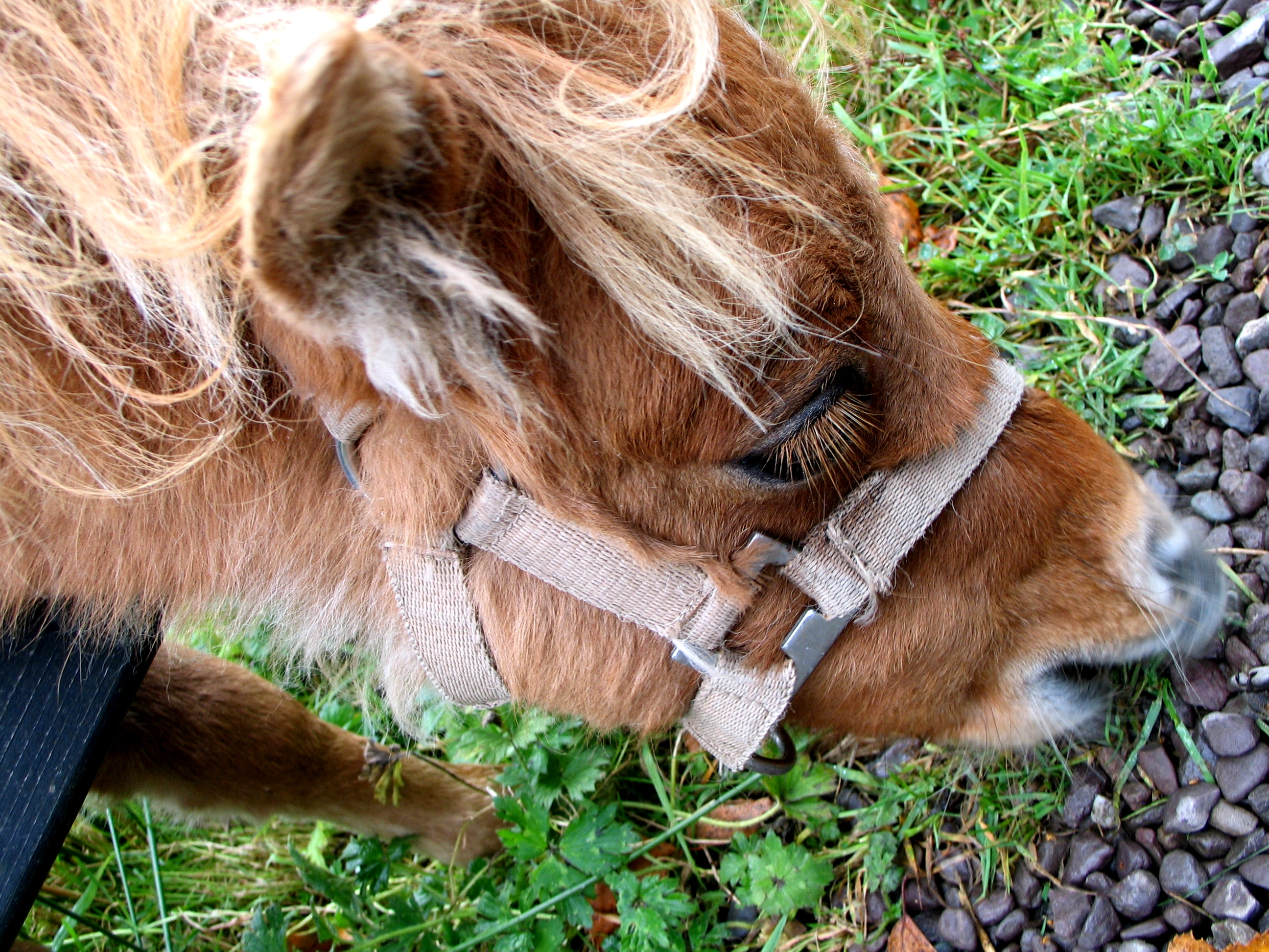 Ring of Kerry Bog Village